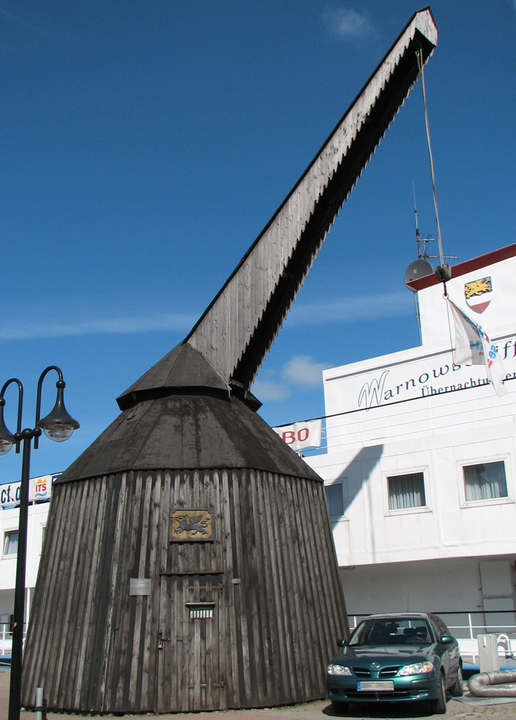 Beschreibung: Nachbau des Hafentretkrans in Rostock / Germany Fotograf: Darkone, 17. August 2005